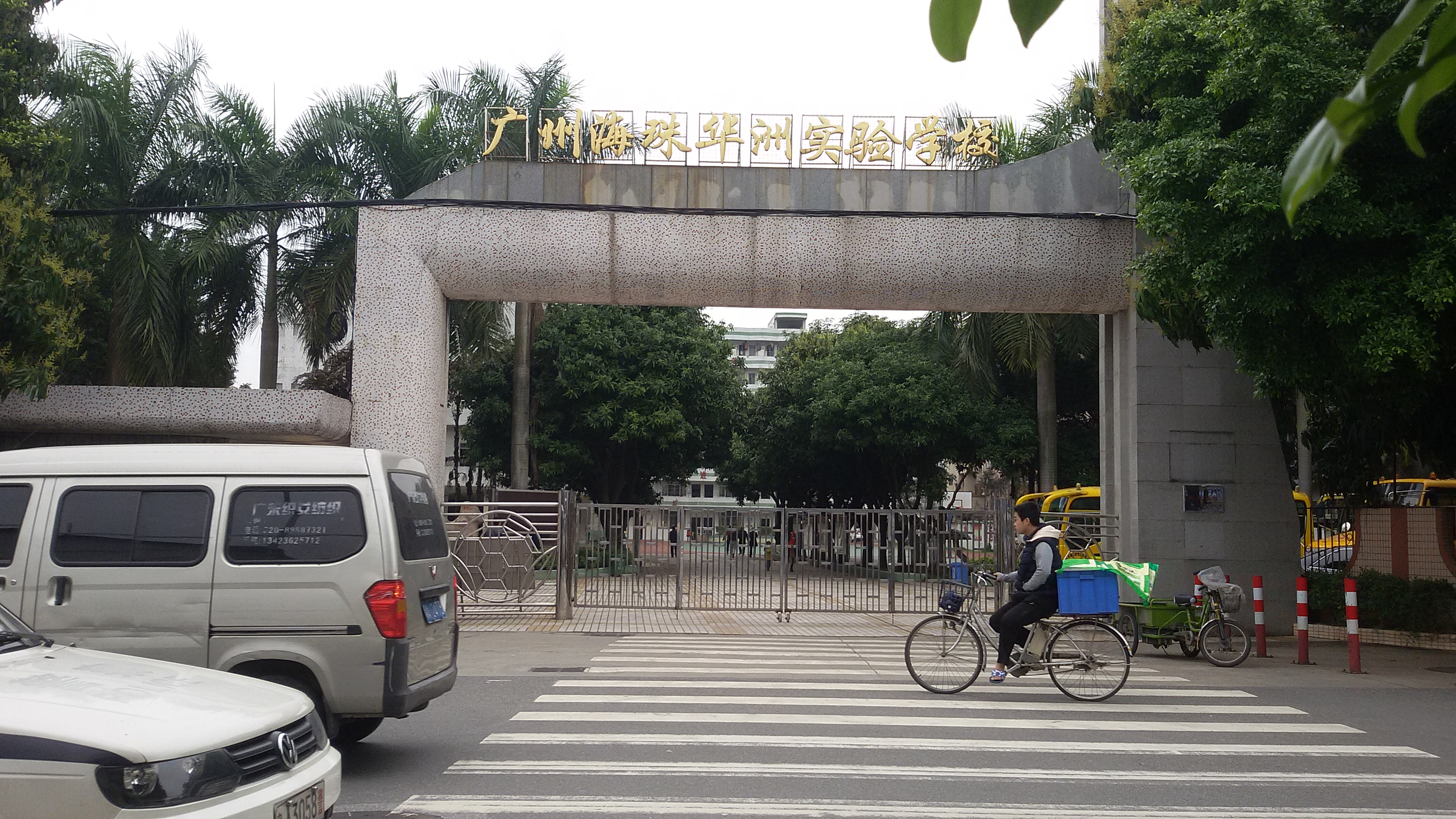 粵語: 廣州海珠華洲實驗學校